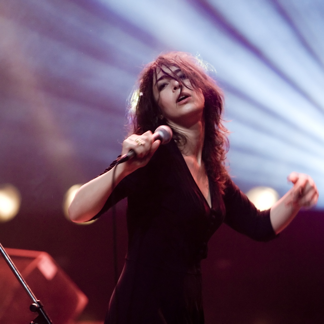 La chanteuse française Adrienne Pauly lors d'un concert au festival "Champs du Rock" le 26 mai 2007.